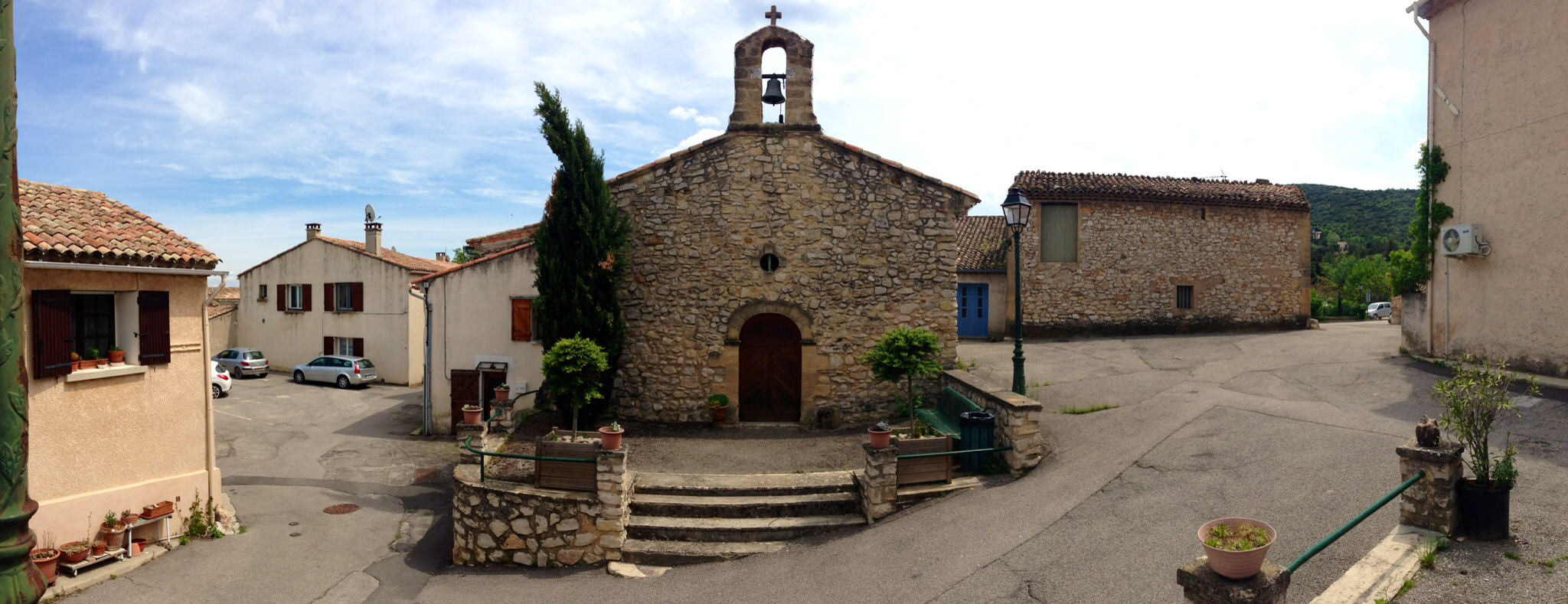 Chapelle Saint Esteve photographié par Yannick Grassi Saint-Estève-Janson 13610 FRANCE